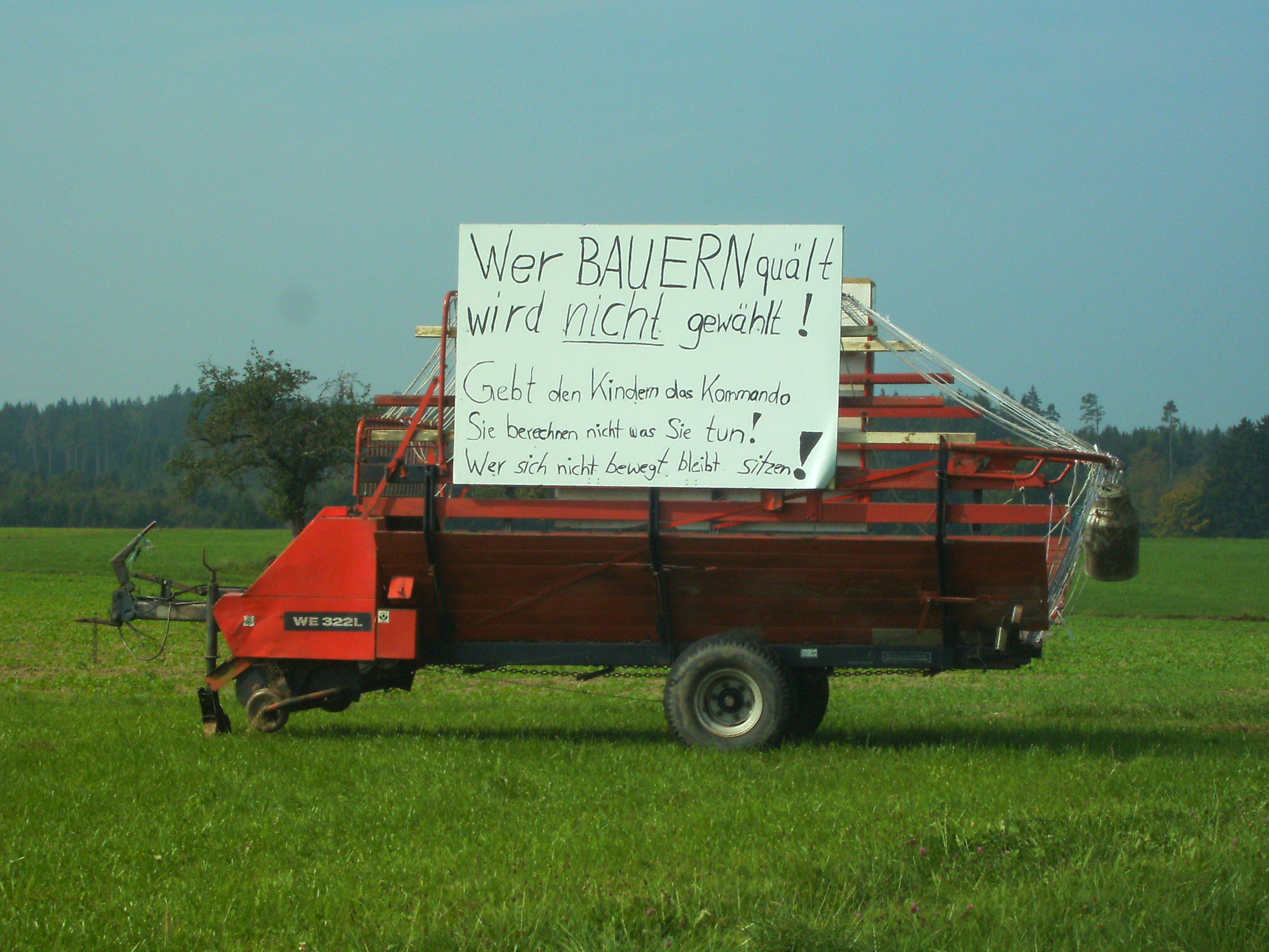 Aktion Bundesverband Deutscher Milchviehhalter, Fahr-Einachsladewagen WE 322L